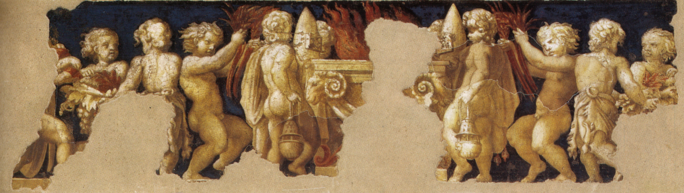 Fregio di san giovanni a parma